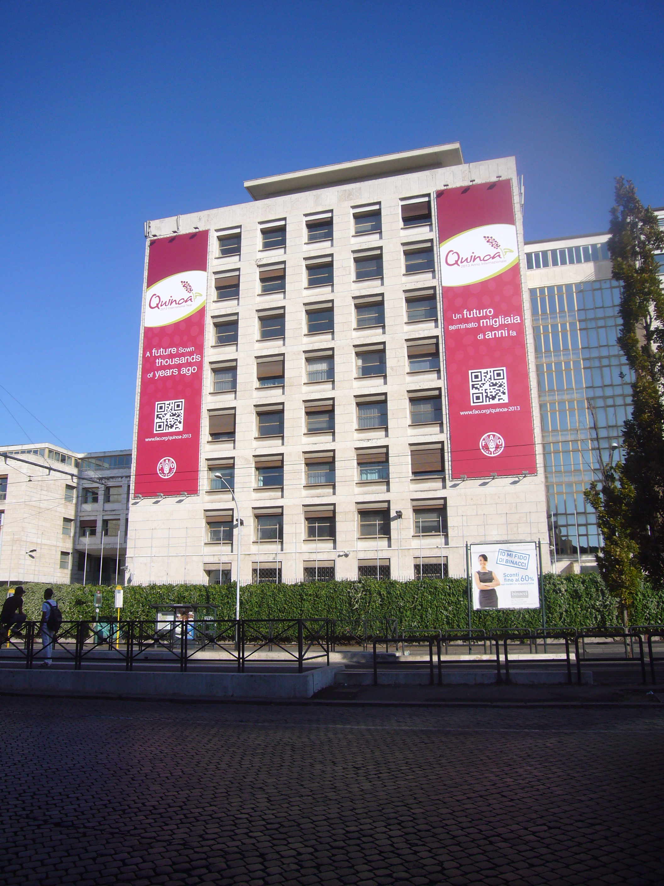 Roma, palazzo della FAO. 2013 anno della Quinoa